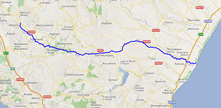 carte réalisée sur umap This map may be incomplete, and may contain errors. Don't rely solely on it for navigation.